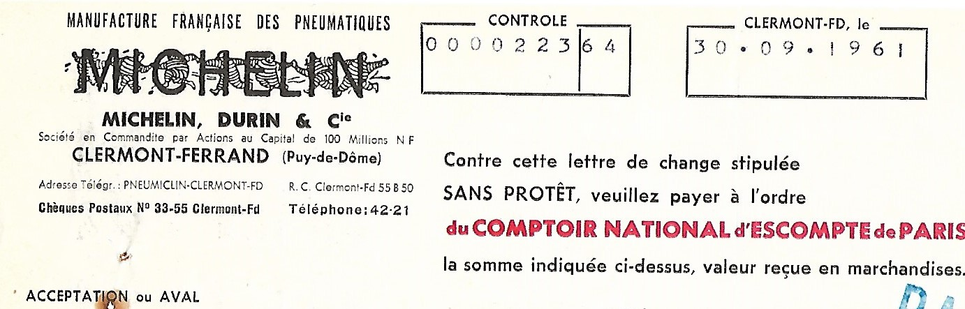 Détail d'une lettre de change émise par la MFPM MICHELIN DURIN & Cie du 30 septembre 1961